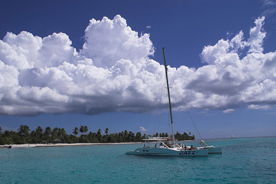 Isla Saona, Dominincan Republic